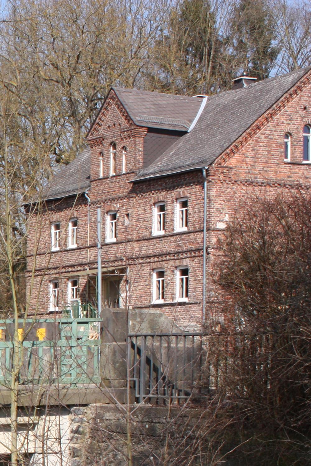 Müllermühle in Hausen, Westerwald (Waldbrunn), Hessen, Deutschland